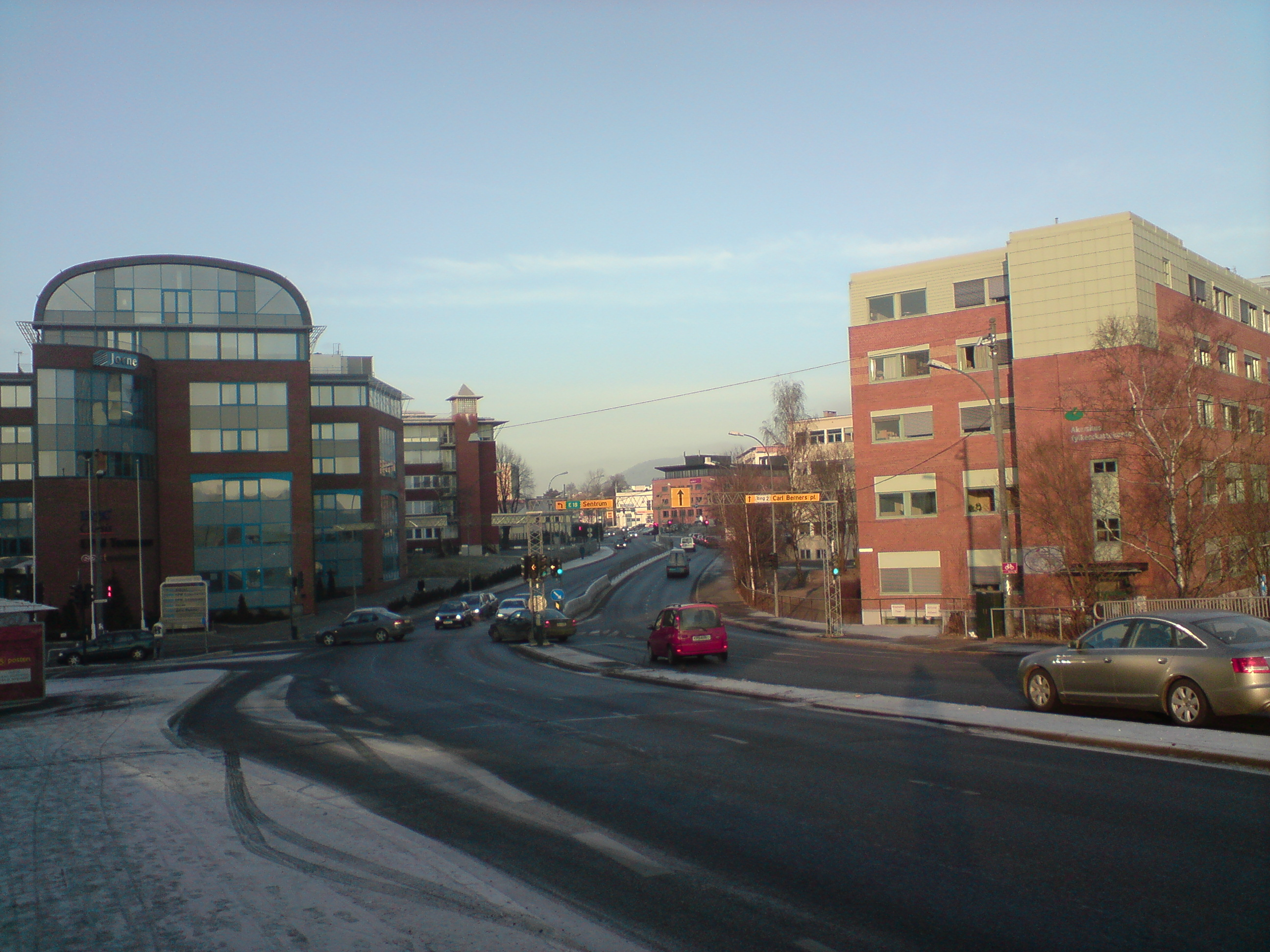 Grenseveien at Helsfyr in Oslo